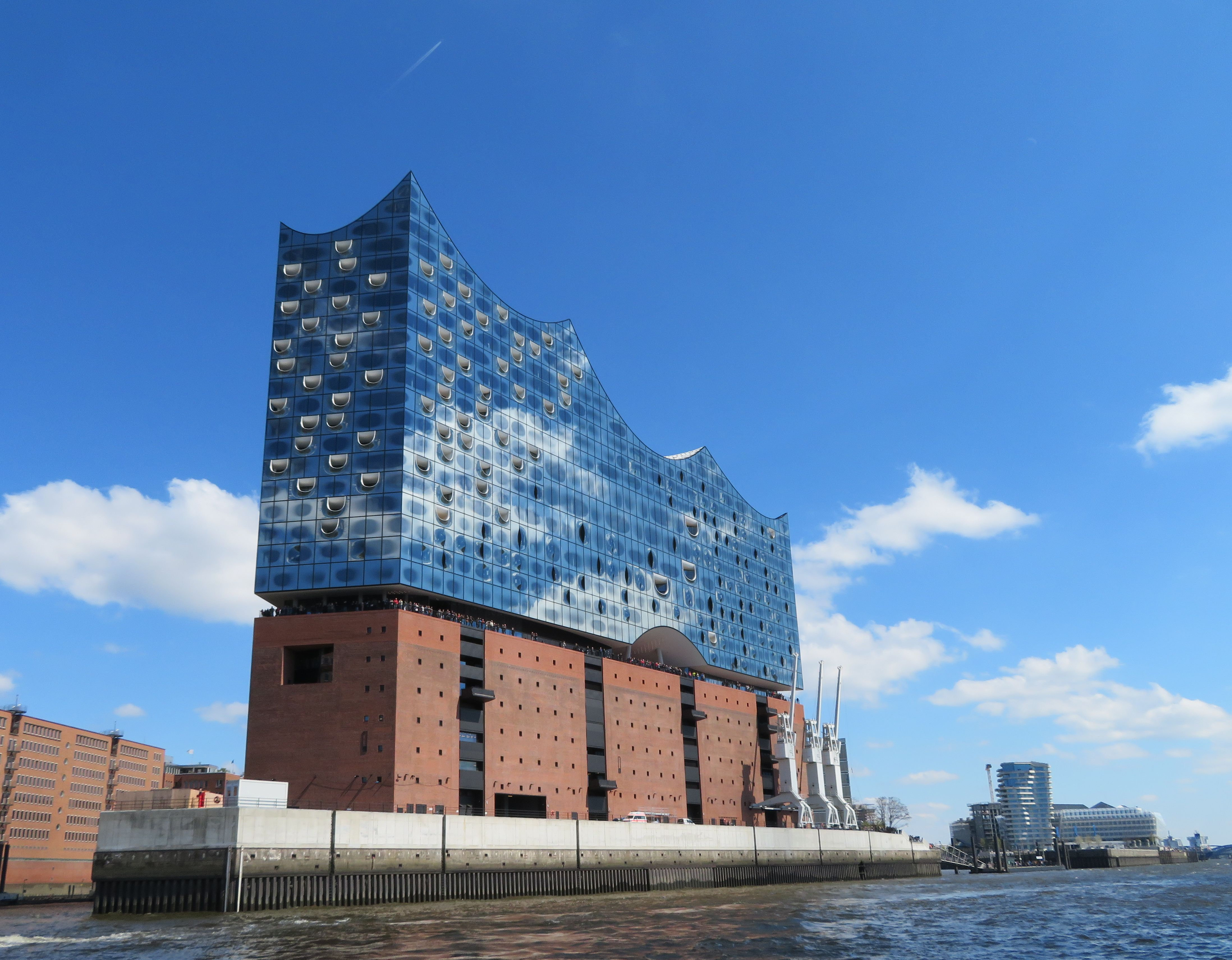 April 2017 in Hamburg